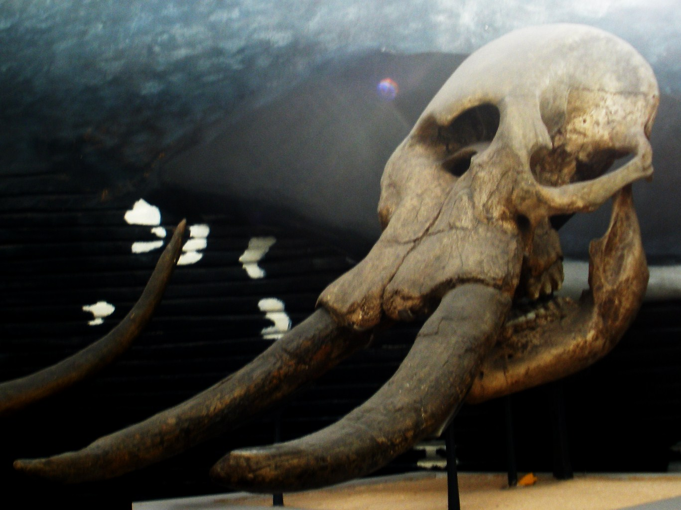 Fossil of Stegomastodon, an extinct mammal -- Took the photo at Natural History Museum, London